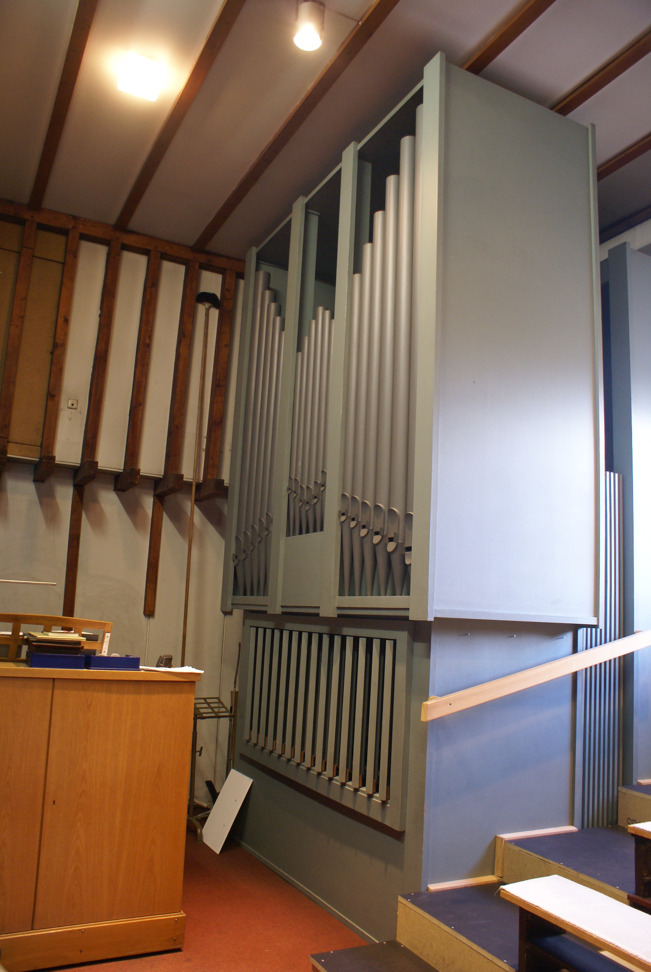 St. Marien in Dorsten-Hervest, Landkreis Recklinghausen, Nordrhein-Westfalen, Deutschland